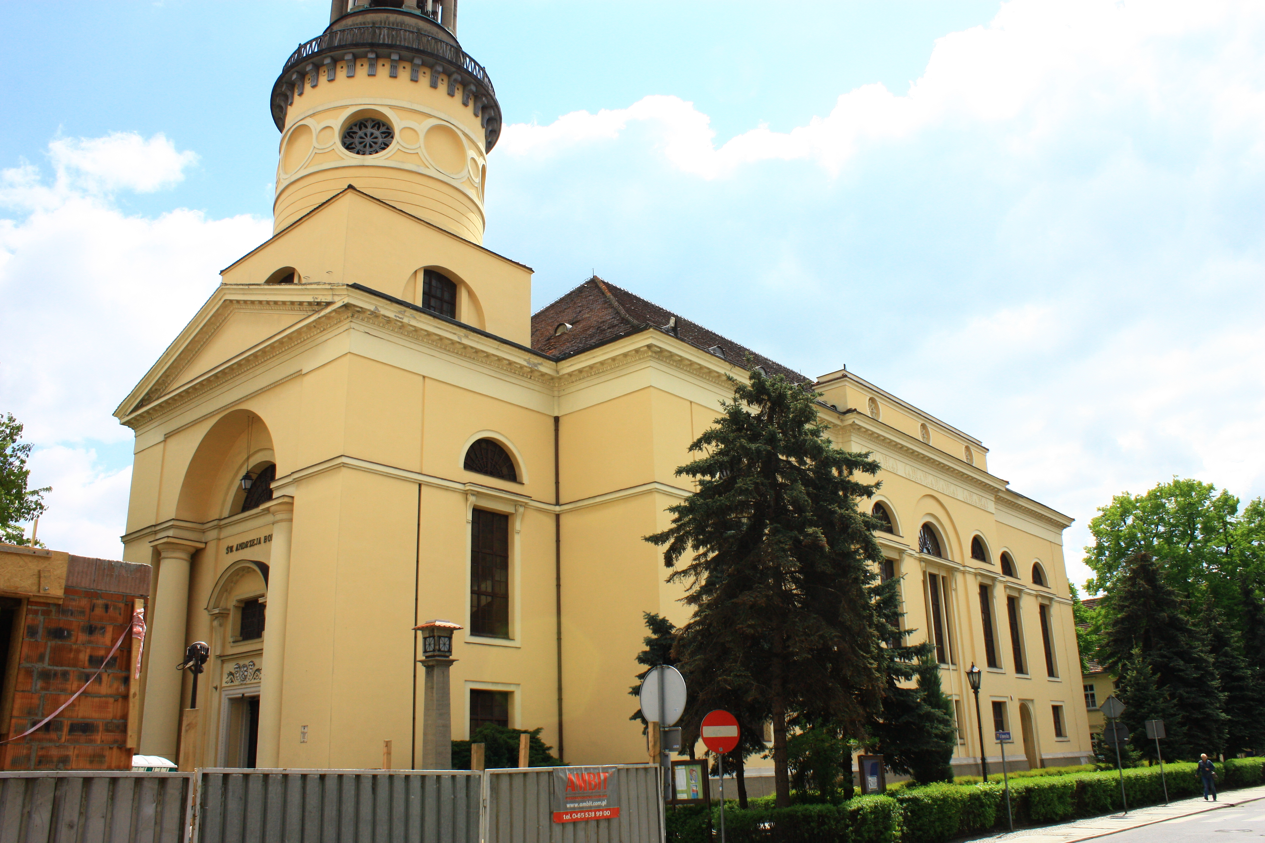 Rawicz, kościół ewangelicki, ob. rzym.-kat. p.w. św. Andrzeja Boboli, 1808, 1915